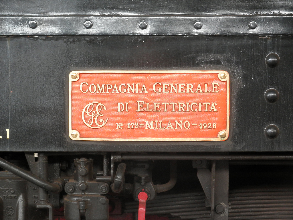 Targa del costruttore (Compagnia Generale di Elettricità) della locomotiva elettrica E.600-3 delle Ferrovie Nord Milano